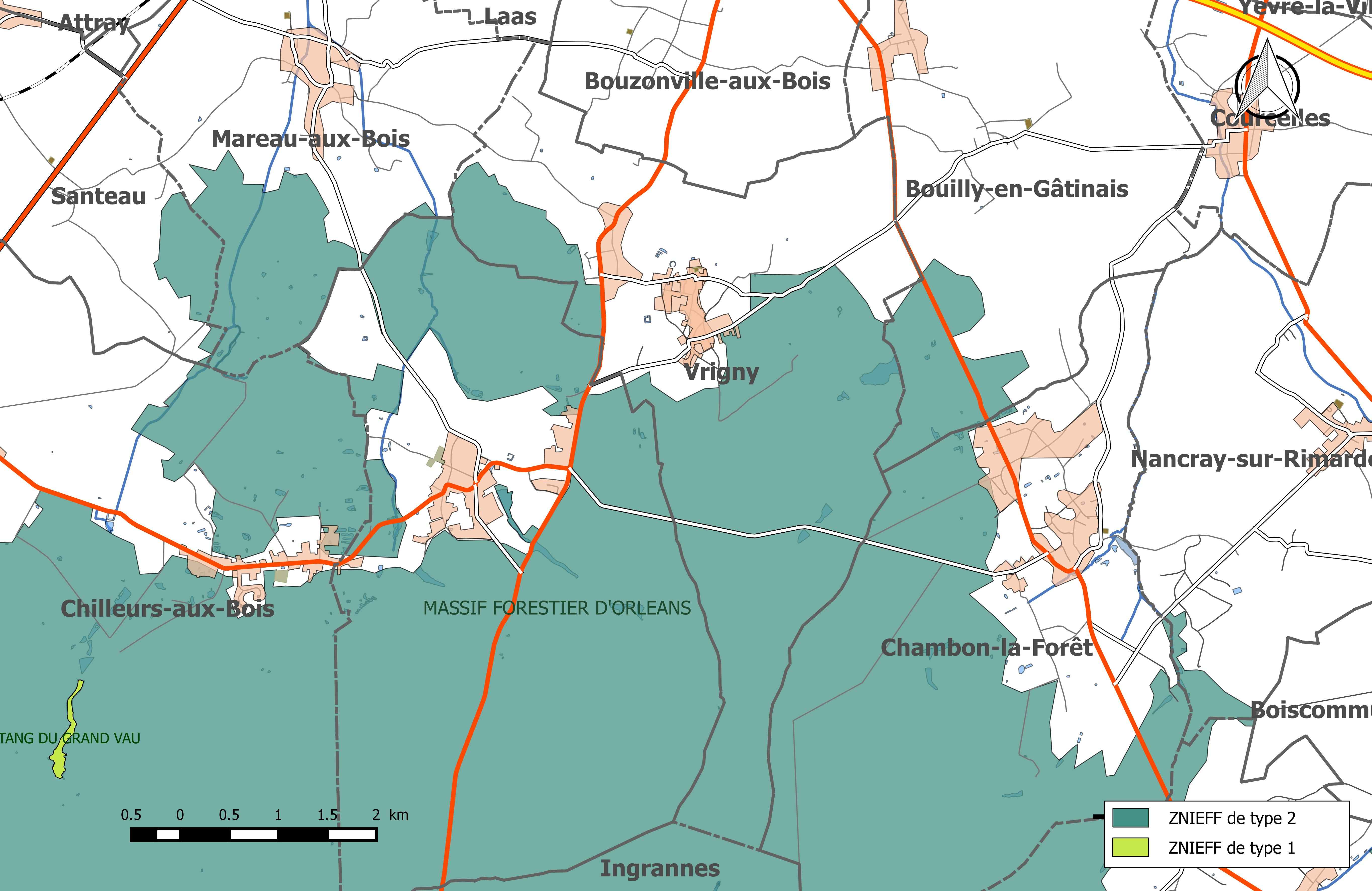 Carte des Zones naturelles d'intérêt écologique faunistique et Floristique (ZNIEFF) de la commune de Vrigny (Loiret).